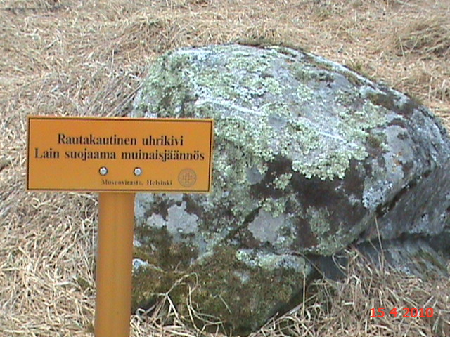 Museoviraston suojelema uhrikivi pellolla.